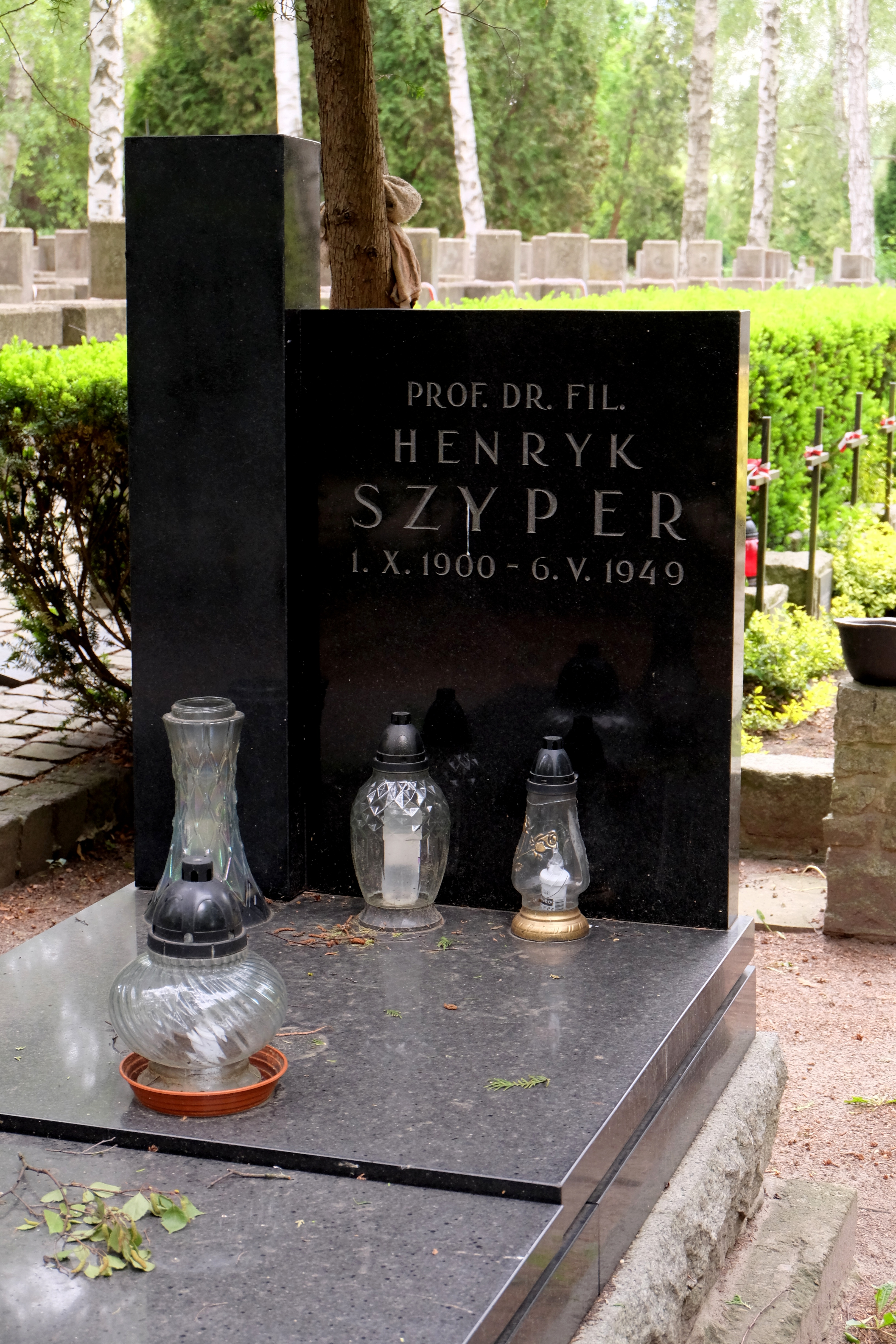 Grób historyka literatury Henryka Szypera na Cmentarzu Wojskowym na Powązkach w Warszawie